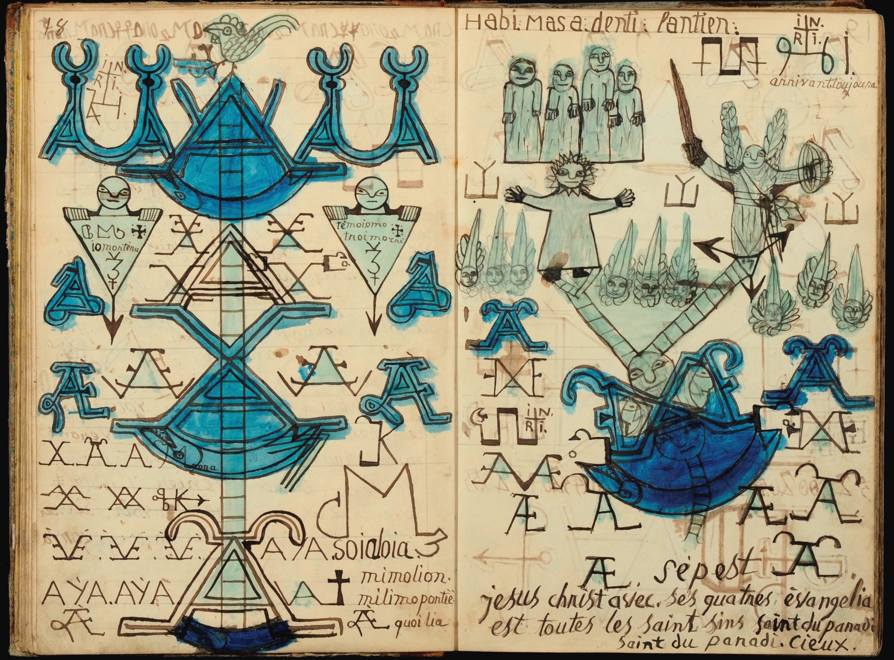 Pierre Richard 1802-1879 Album 1